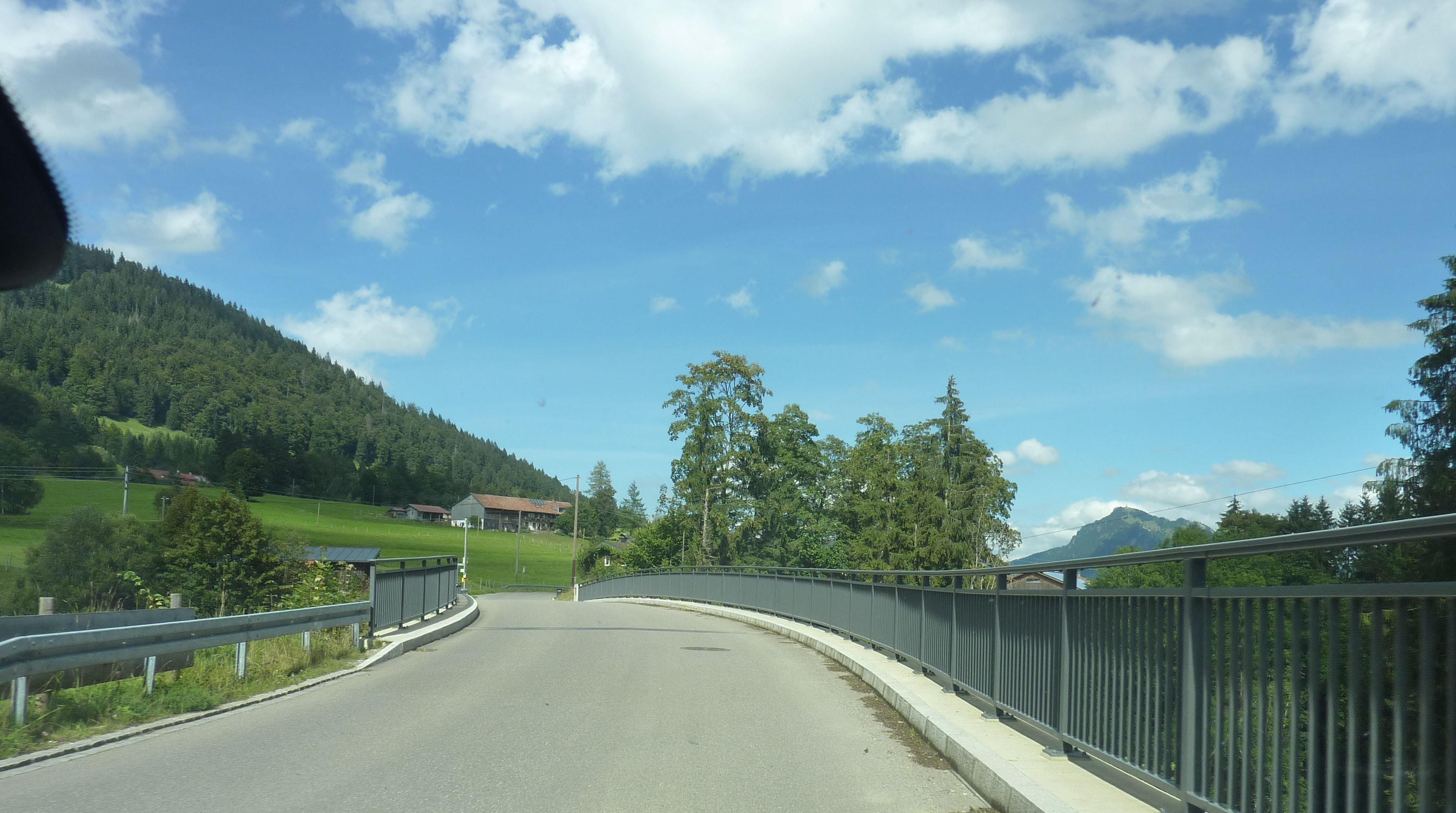 Hohe Brücke im Gunzesrieder Tal